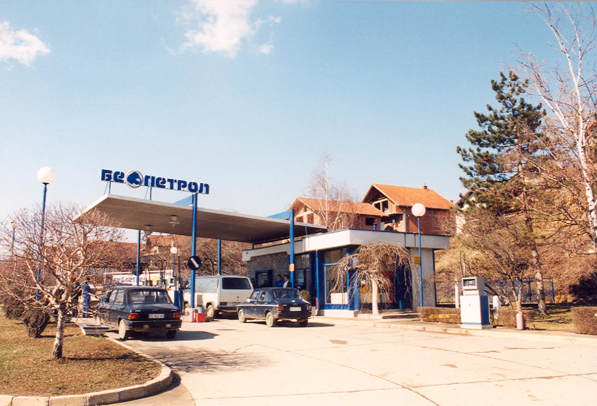 Benzinska stanica Beopetrola u Aleksandrovcu Župskom